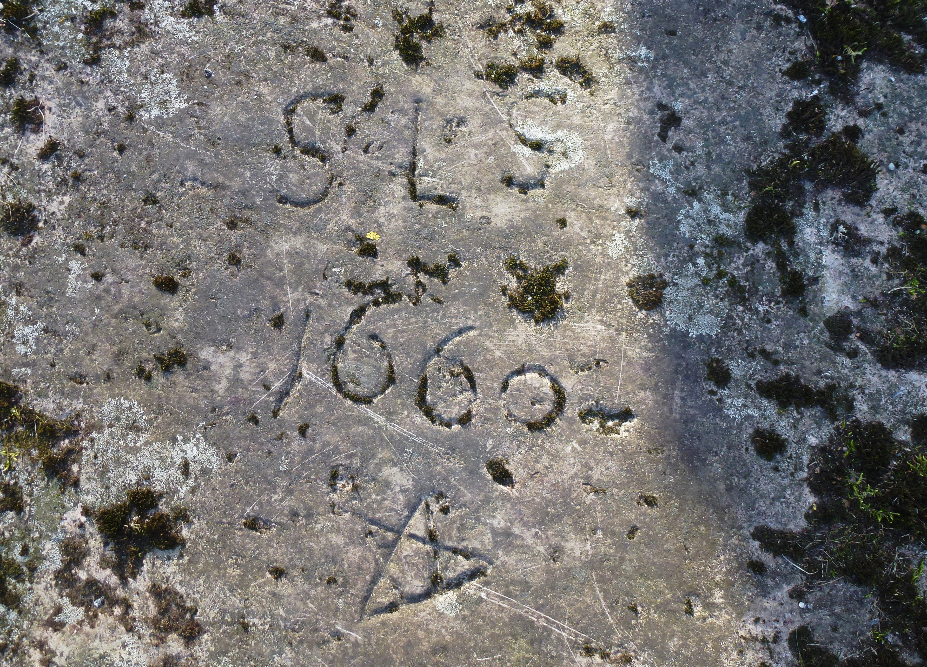 Kyrkogårdens äldsta bevarade gravsten bär årtalet 1660 och bokstäverna ”SLS” som kan tydas S(epulti) L(oco) S(ancto), vilket på latin betyder ”begravda på helig/vigd plats”.